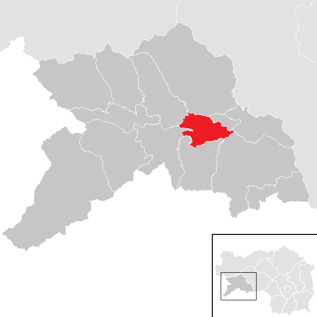 Lage von Teufenbach-Katsch im Bezirk Murau